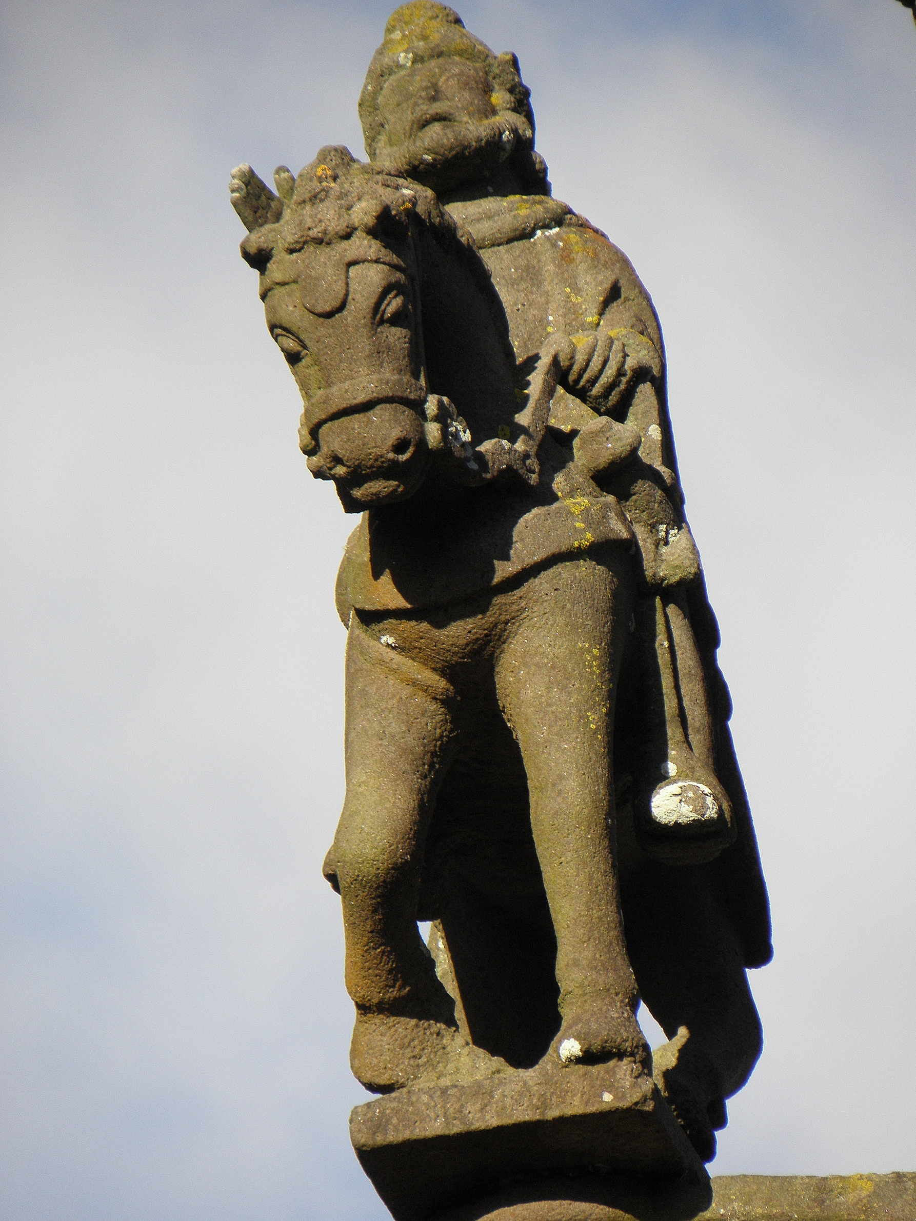 Cavalier droit du croisillon supérieur, face ouest, du calvaire de Saint-Thégonnec (29). .